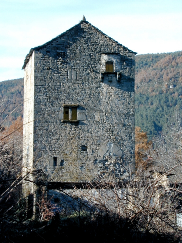 Torre defensiva aislada con diferentes tipos de aberturas